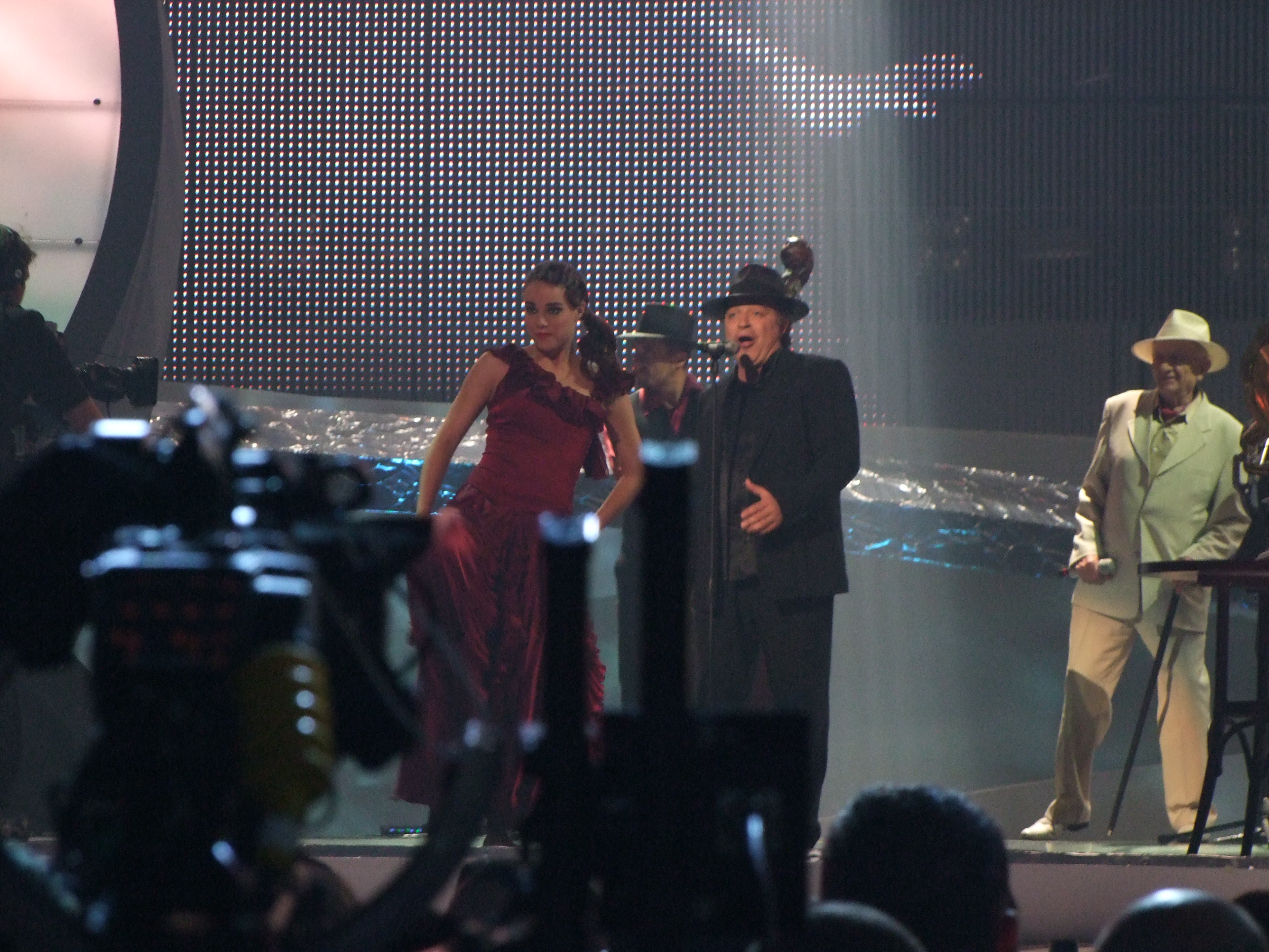 Final Eurovision 2008